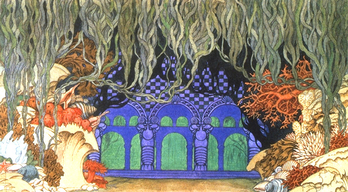 THE WATER KINGDOM. Stage-set design for Scene Six of the opera Sadko by Rimsky-Korsakov. 1914